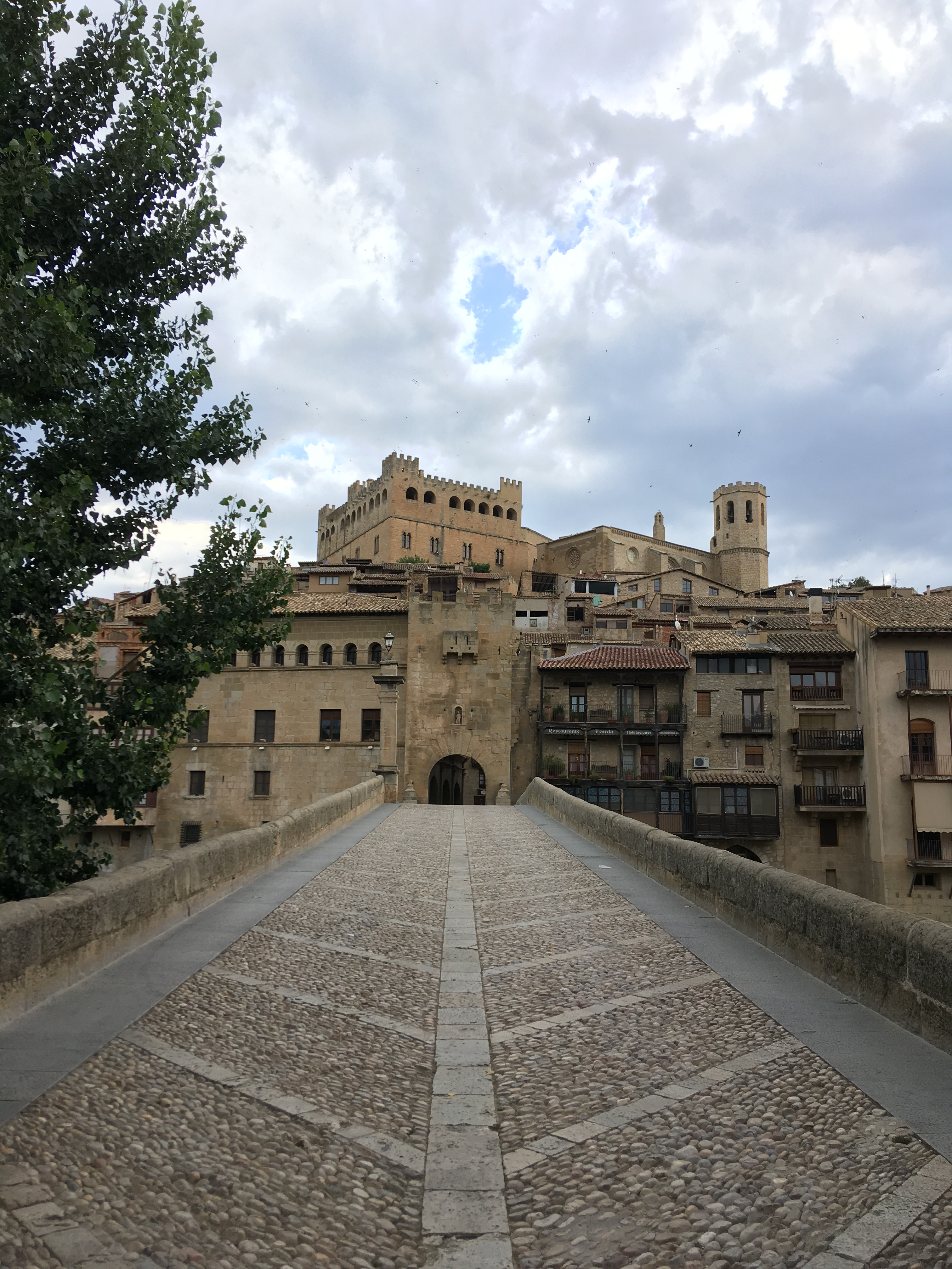 Valderrobres #Matarranya #Matarraña